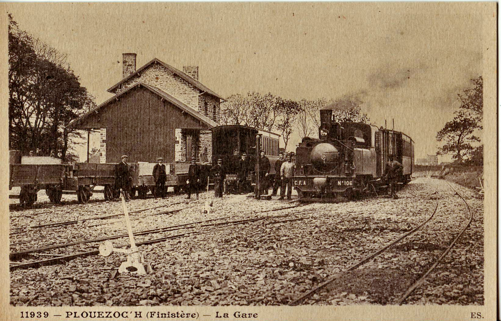 Carte postale ancienne éditée par ES n°11939 PLOUEZOC'H - La Gare Vue en gros plan de la locomotive n°106 des CFA, construite par Corpet & Louvet et livrée le 17 juillet 1911 (n° constructeur 1349)